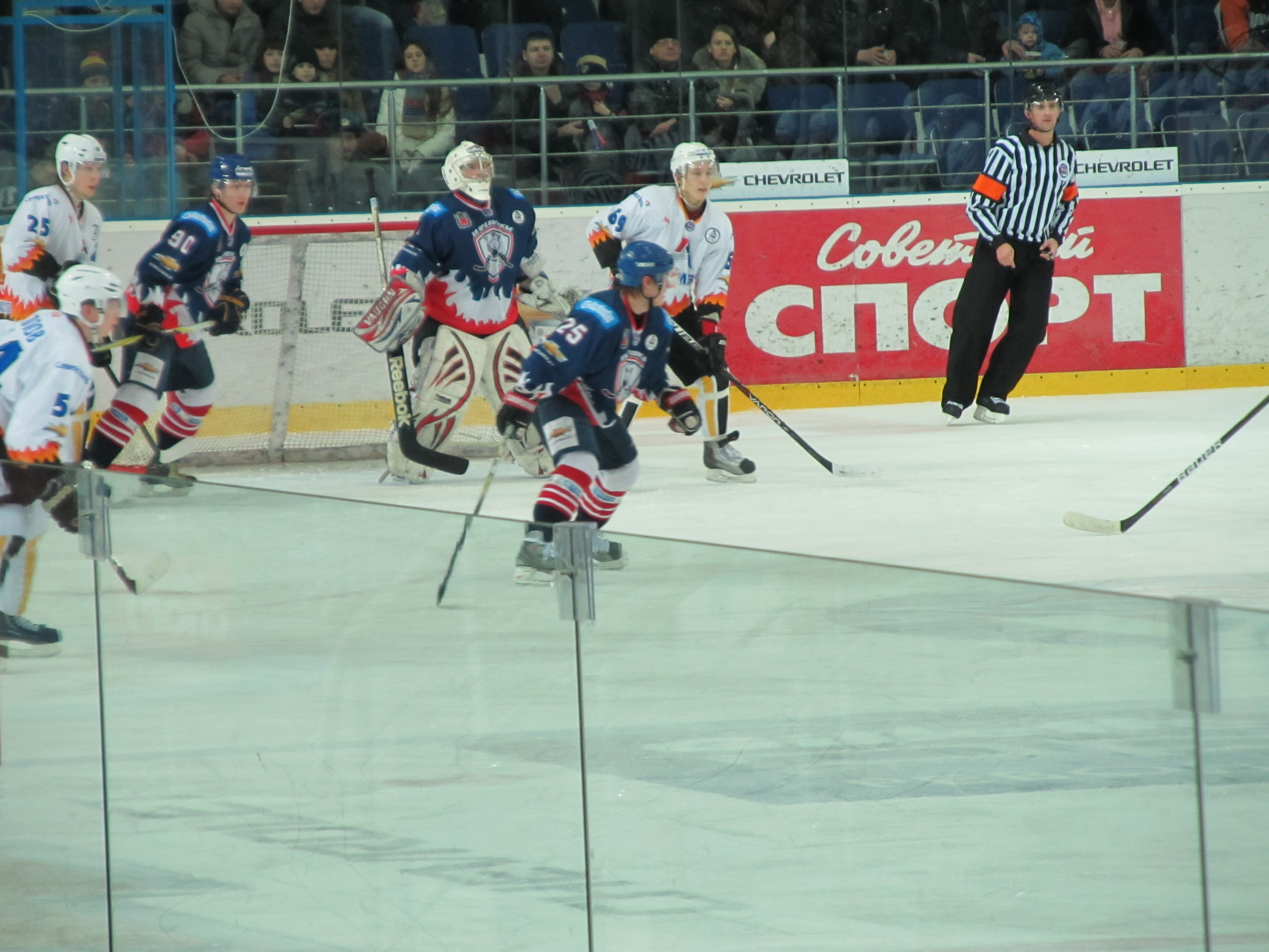 Ледовый дворец Звездный игра Белые Тигры - Алмаз